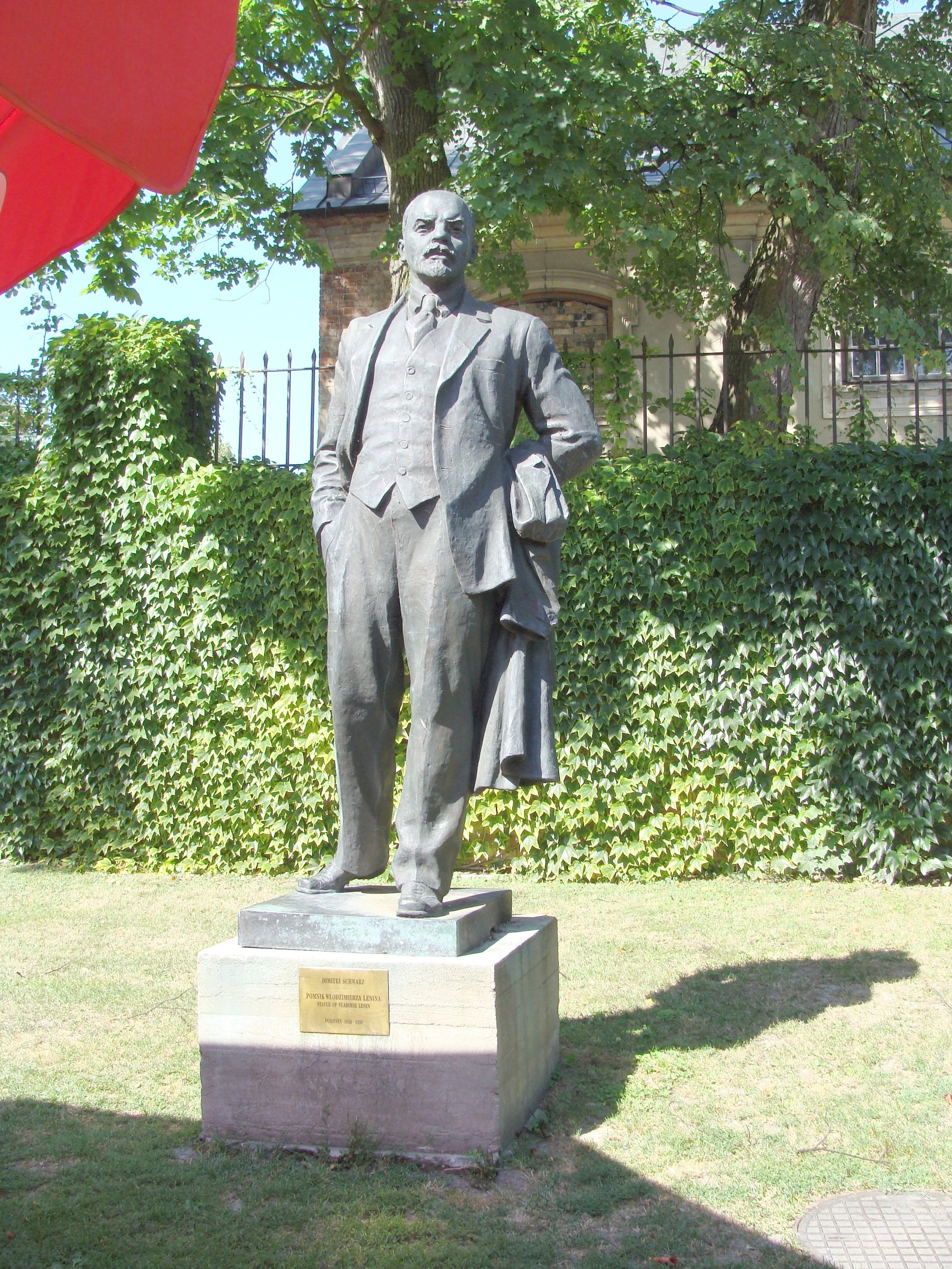 Pomnik Lenina z Poronina. Obecnie w Kozłówce